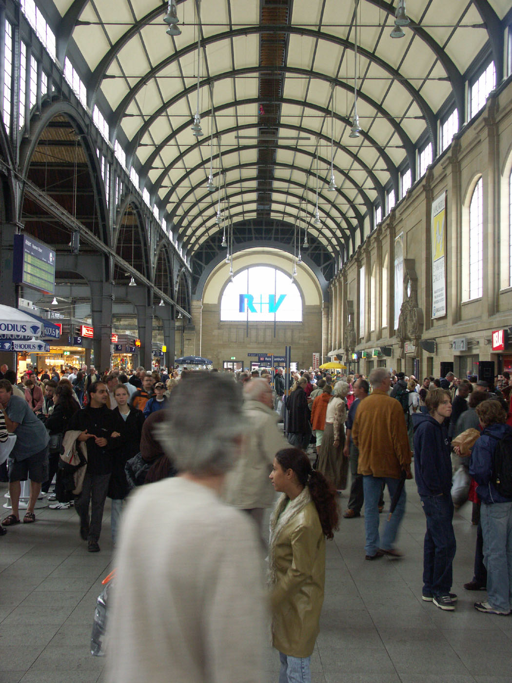 Wiesbaden főpályaudvara belülről